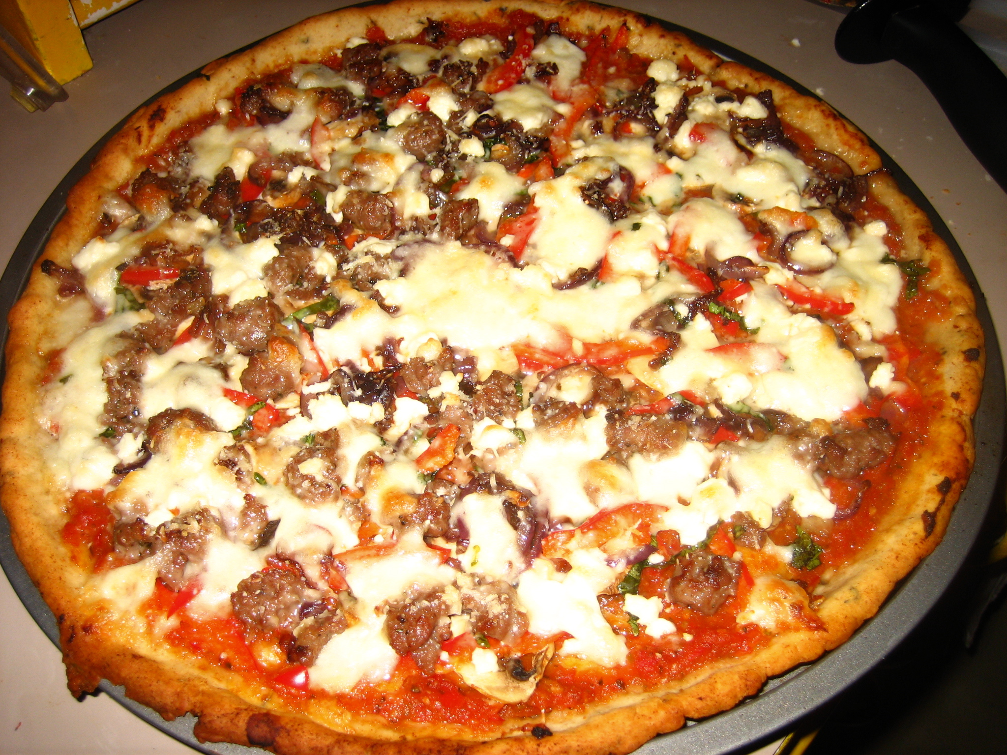 Dave's pizza